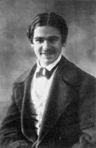 Filippo de Pisis vers 18 ans.